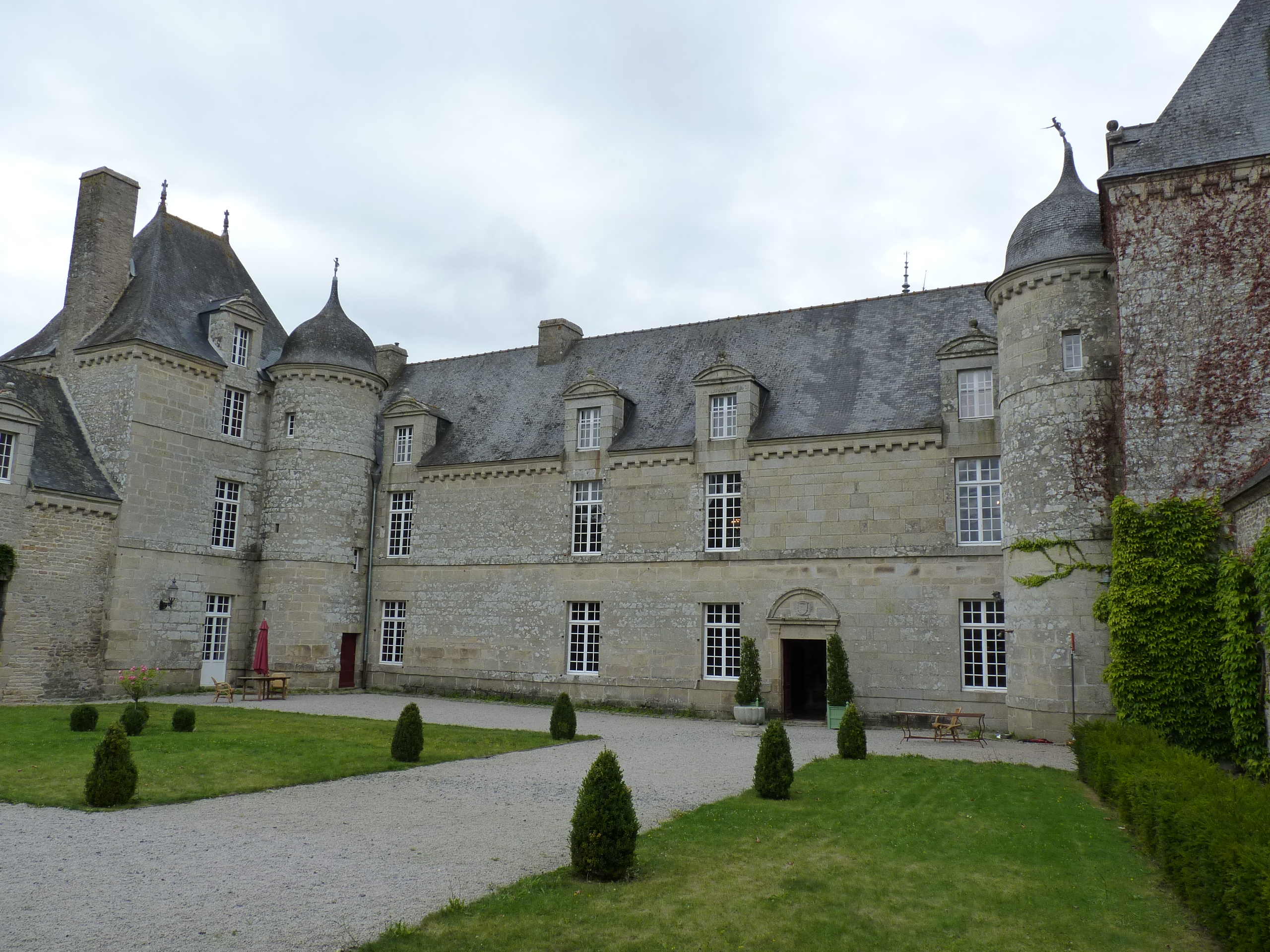 Château du 16ème-17ème siècle construit dans un style médiéval. Cour du château.